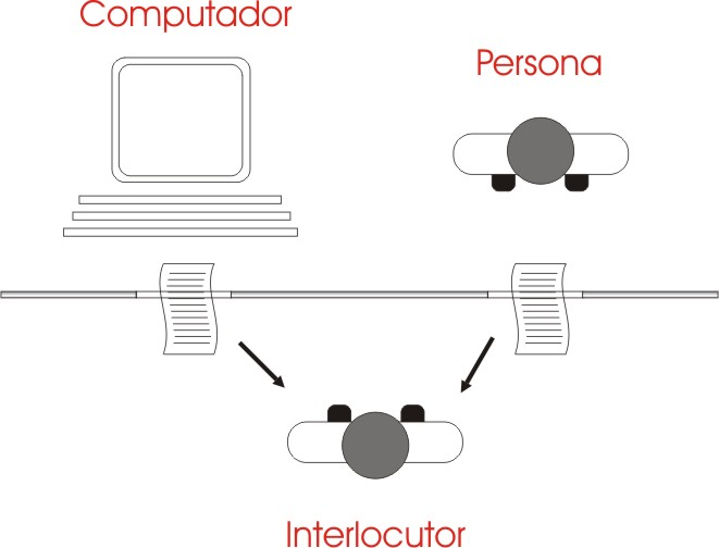 Esquema del test o prueba de Turing